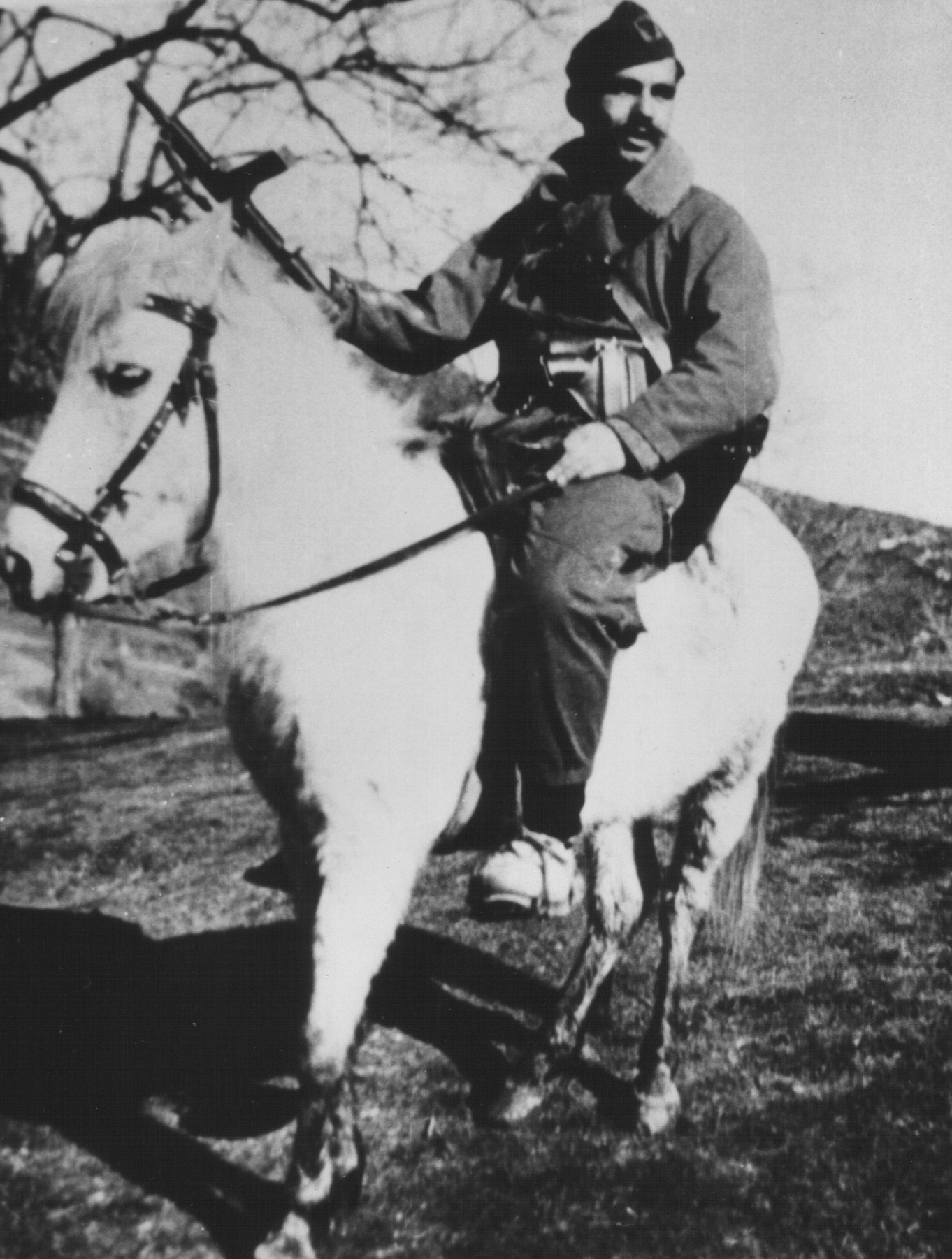 Srpskohrvatski / српскохрватски: Fadil Hodža, komandant Glavnog štaba NOB-a Kosova.